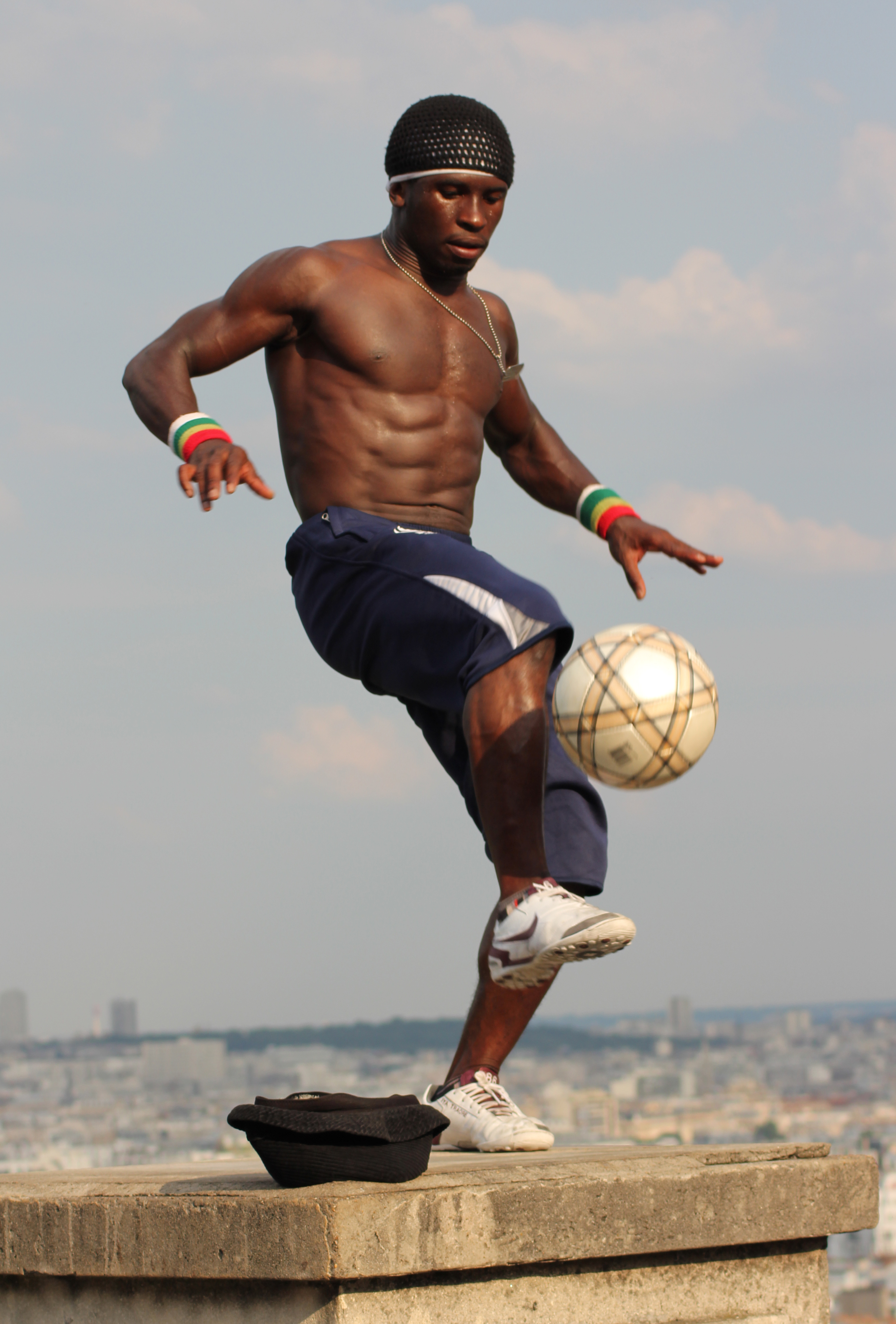 Montmartre, PARIS XVIIIème